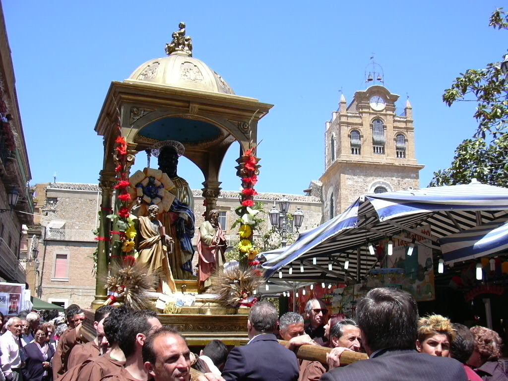 Aidone EN_Sicilia: processione dei 1° maggio per la festa di San Filippo Apostolo che attrae da tutta la provincia e oltre decine di migliaia di pellegrini